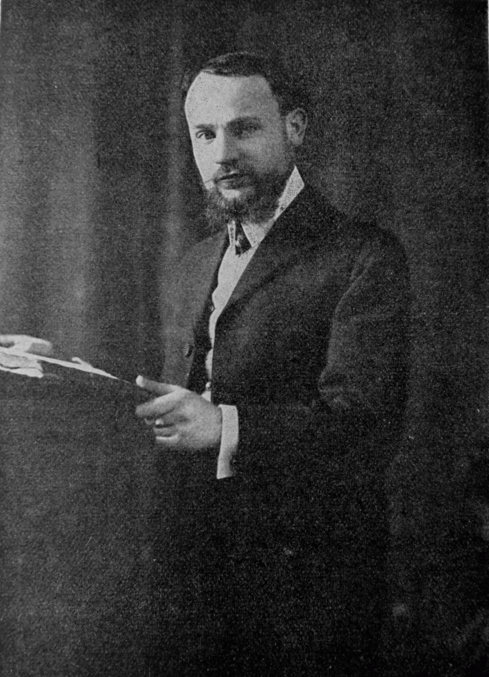 Milan Rastislav Štefánik (* 21. července 1880 Košariská – 4. května 1919 Ivanka pri Dunaji) byl slovenský politik, generál francouzské armády a také astronom. V letech 1914 – 1918 organizoval československé legie v Srbsku, Rumunsku, Rusku, Itálii. Byl členem Národní rady v Paříži a v letech 1918 - 1919 československým ministrem vojenství. Na fotografii Dr. M. R. Štefánik jako člen Národní rady kdesi v Rusku. Foto před rokem 1919.